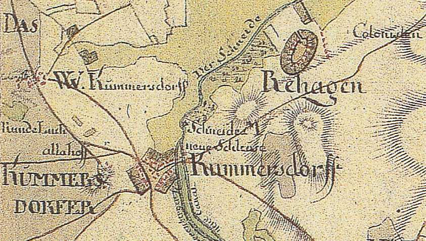 Karte von Kummerdorf und Rehagen (Ortsteile der Gem. Am Mellensee, Brandenburg, Deutschland), aus den Jahren 1767 bis 1787, Land Brandenburg, Deutschland